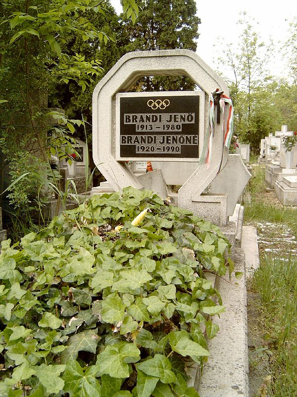 Brandi Jenő (1913–1980) olimpiai bajnok vízilabdázó sírja Budapesten. Új köztemető: 64/9-1-55